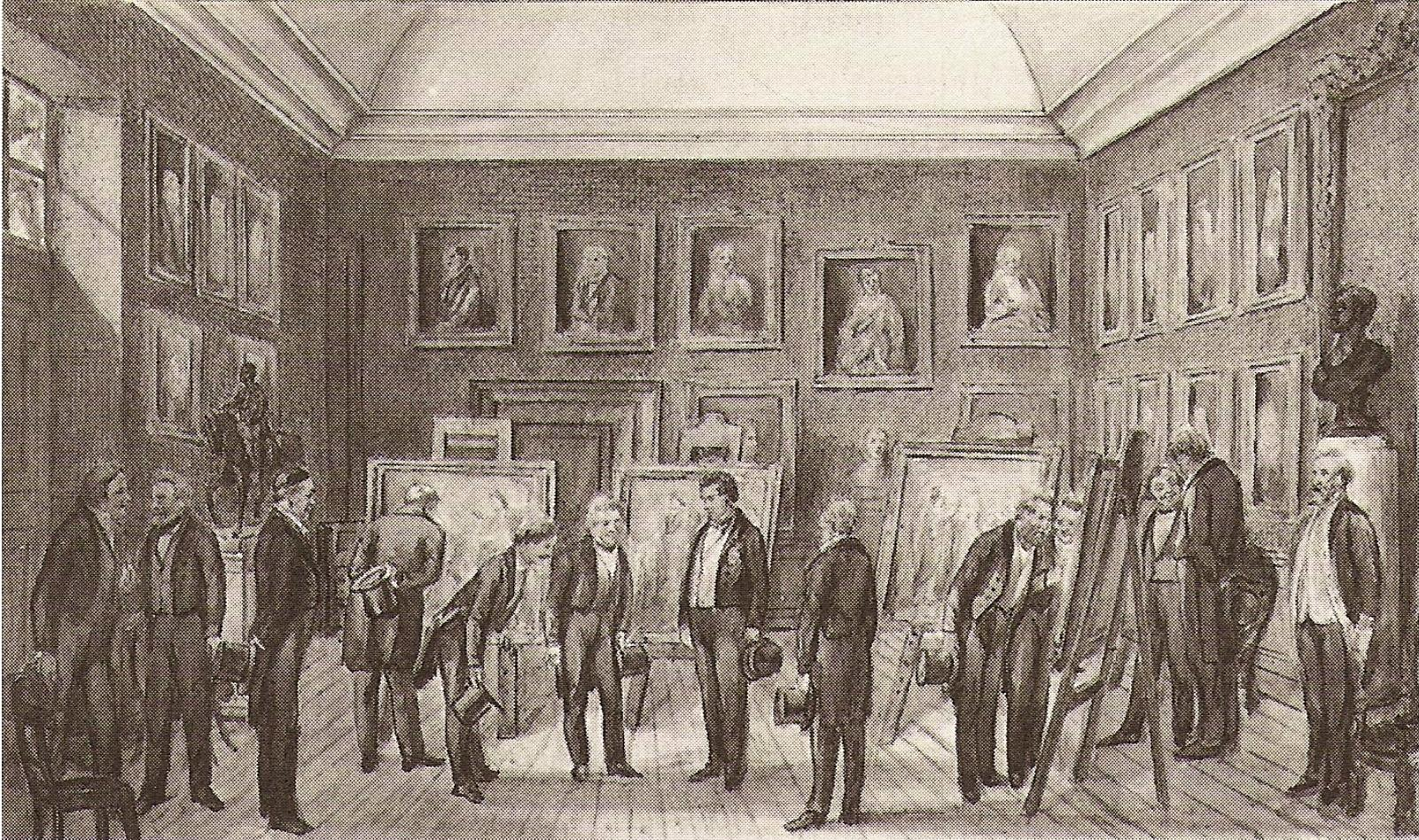 Christian VIII på besøk i Det Kongelige Danske Kunstakademi